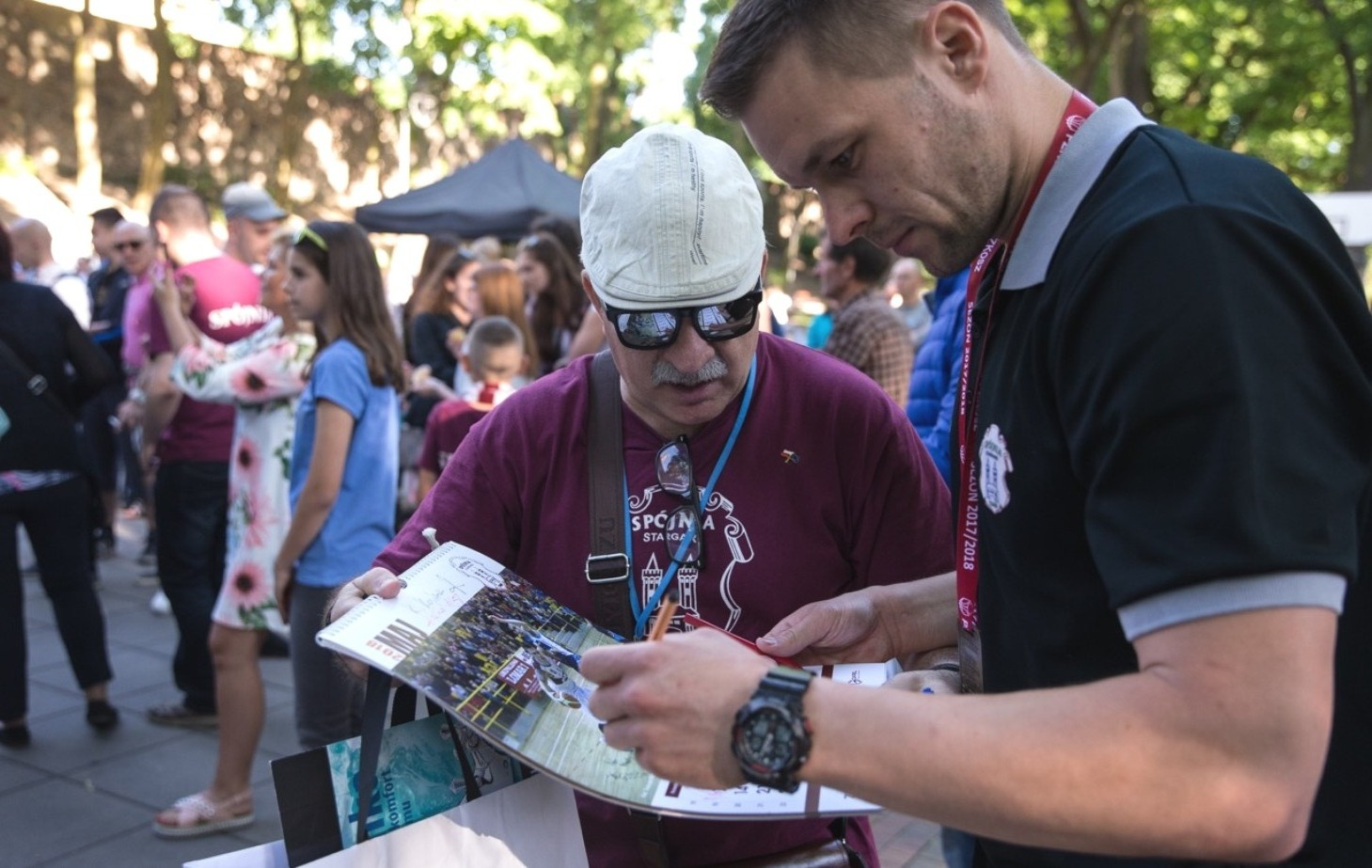 Feta stargardzka po awansie do ekstraklasy (19.05.2018)